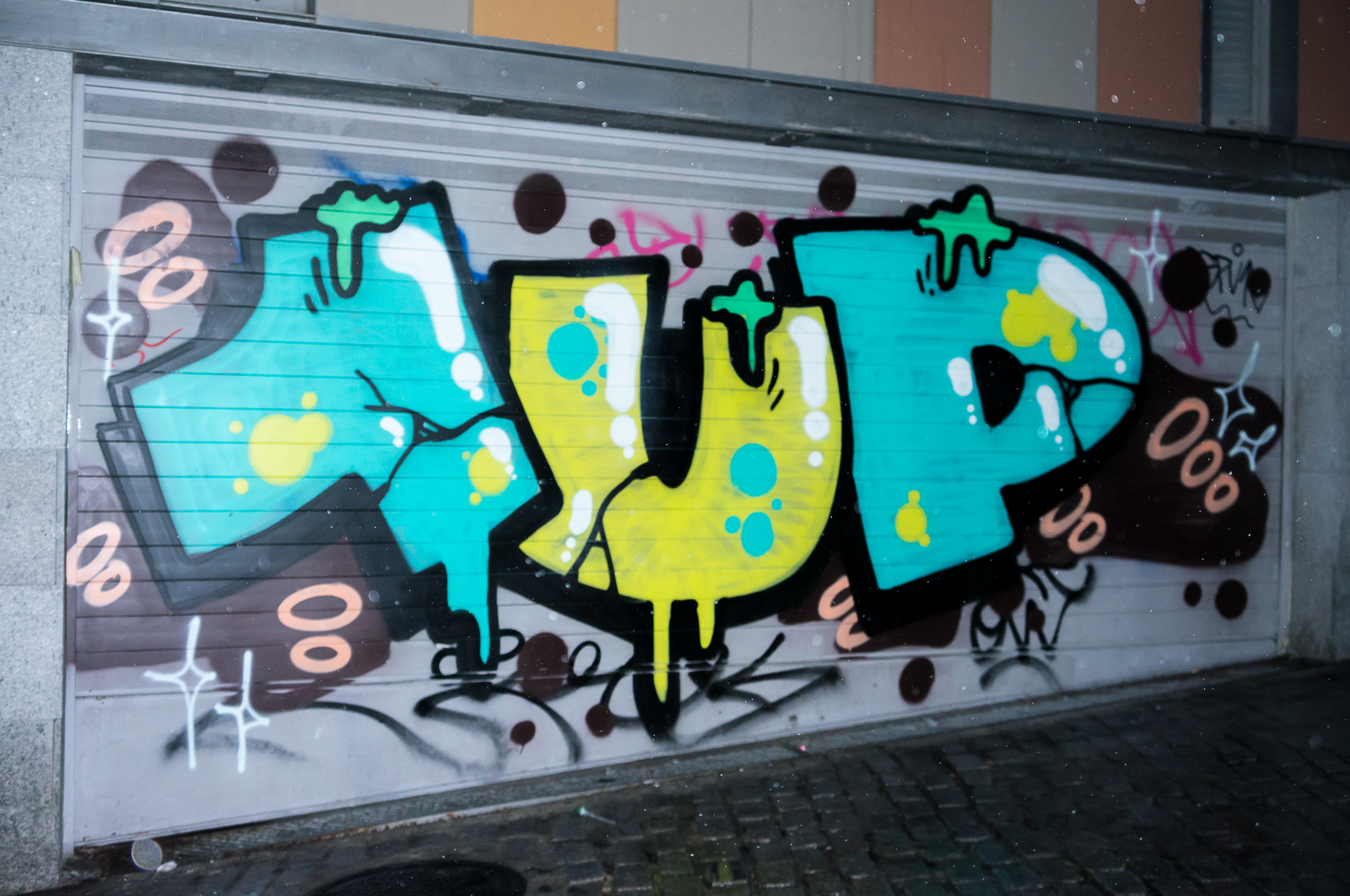 Throw-Up von 1UP in Madrid